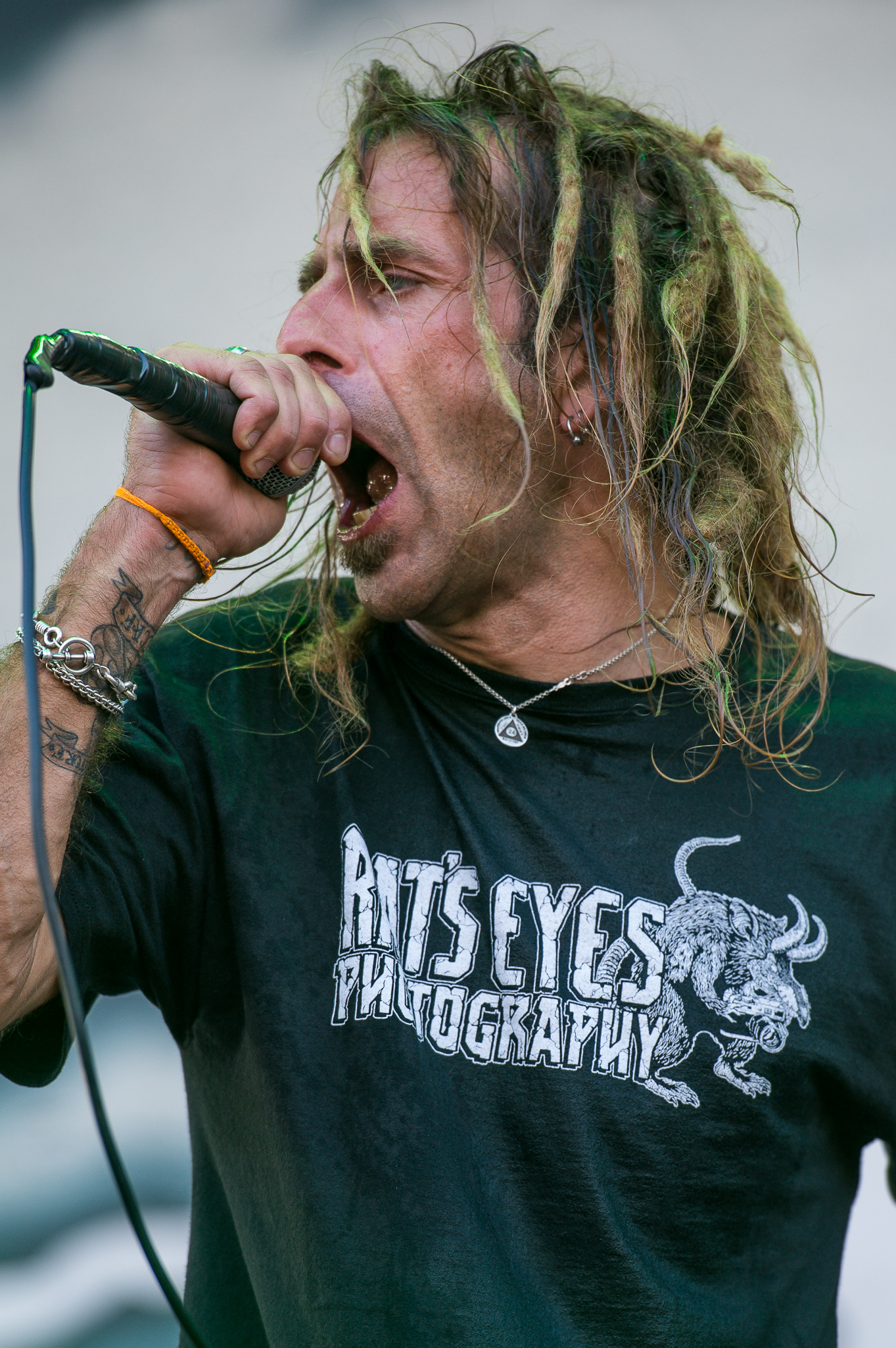 ARGO-Konzerte,Beck's Park Stage,Festival,Konzert,Lamb of God,Livekonzert,Livemusik,Musik,Randy Blythe,RiP,Rock im Park 2015